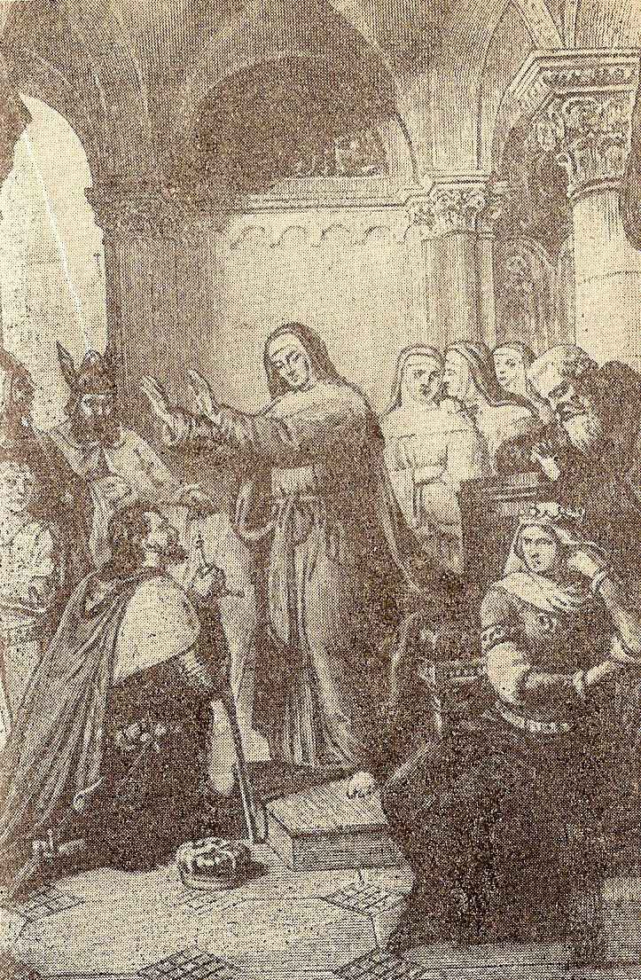 Św. Jadwiga błogosławi wyruszającego w bój Henryka Pobożnego. Rys. Aleksander Lesser, 1884